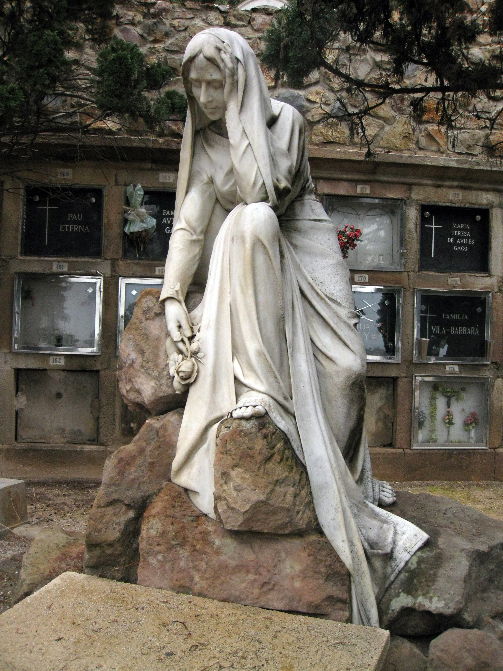 Cementiri de Montjuïc (Barcelona)